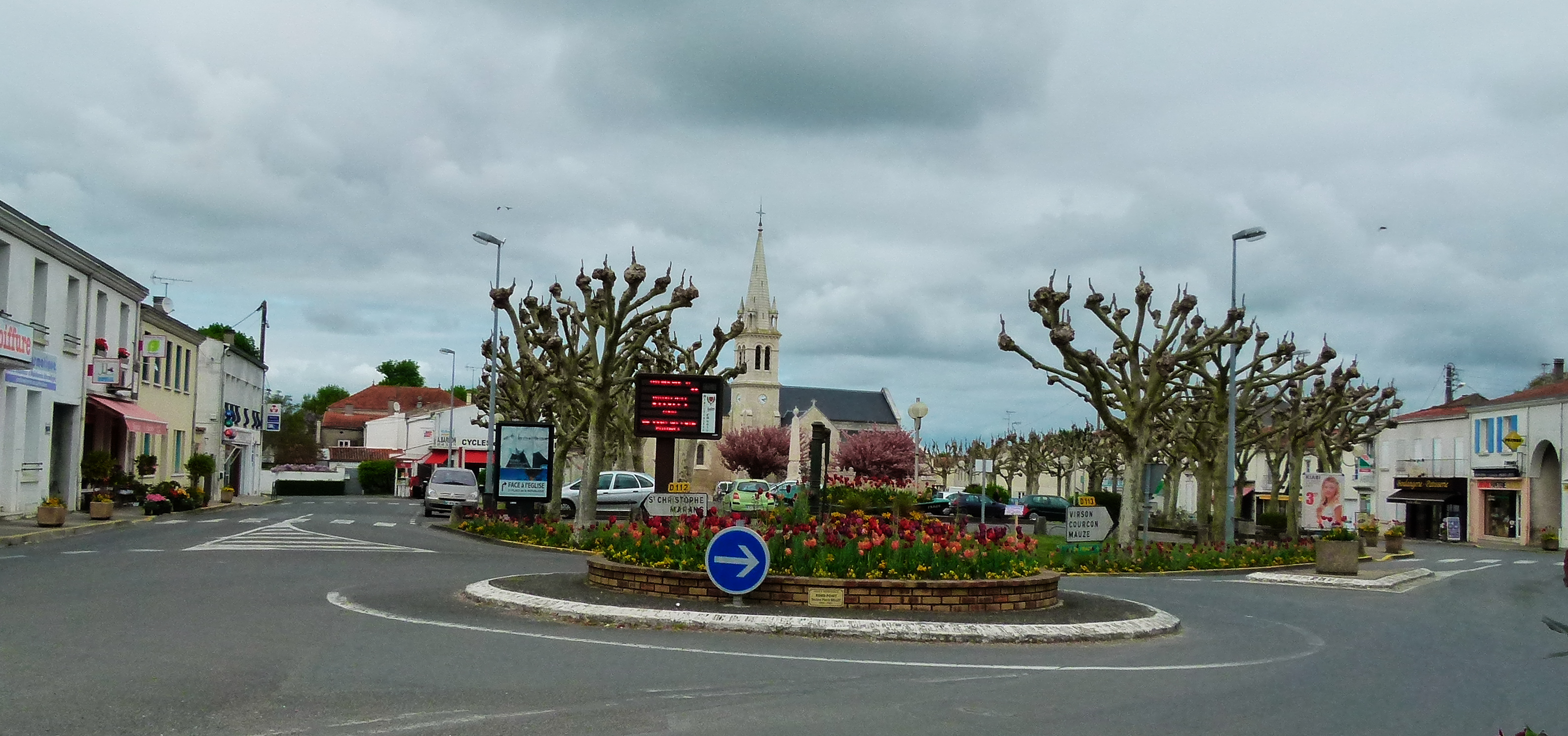 La place de la République, anciennement place de l'église, est située au cœur de la ville d'Aigrefeuille-d'Aunis.